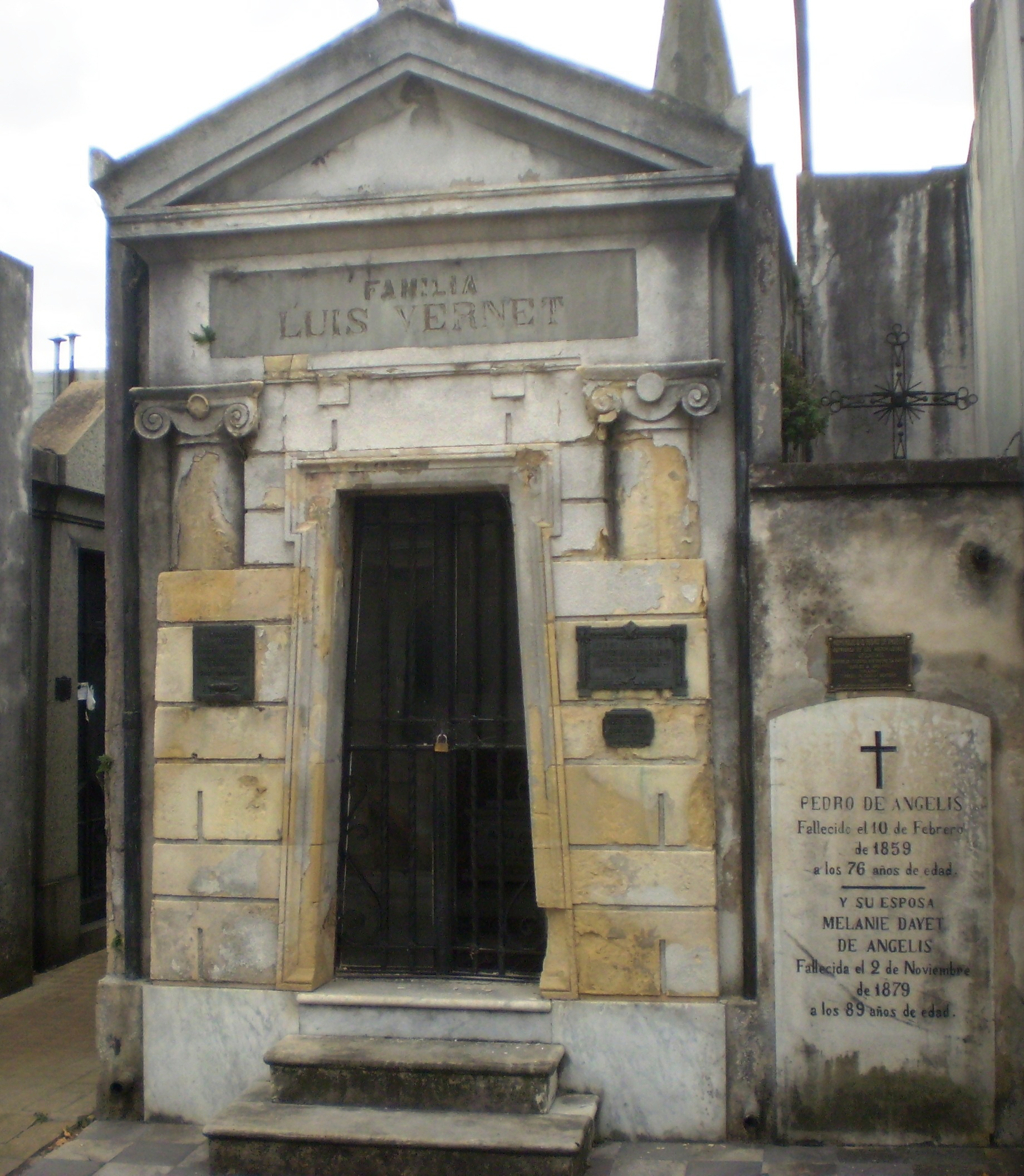 Monumento fúnebre de Luis Vernet, Cementerio de la Recoleta, Buenos Aires.